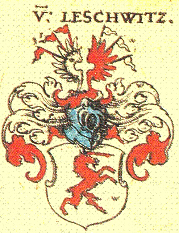 Wappen der Familie von Lüschwitz nach Siebmachers Wappenbuch, Blatt 109, 1, 1605.